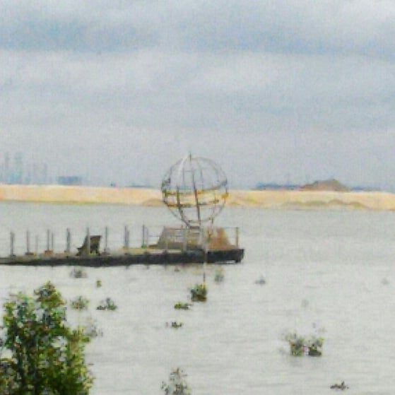 Arca glob yang menandakan titik terselatan benua Asia yang terletak di hujung titian yang merentasi hutan paya bakau.